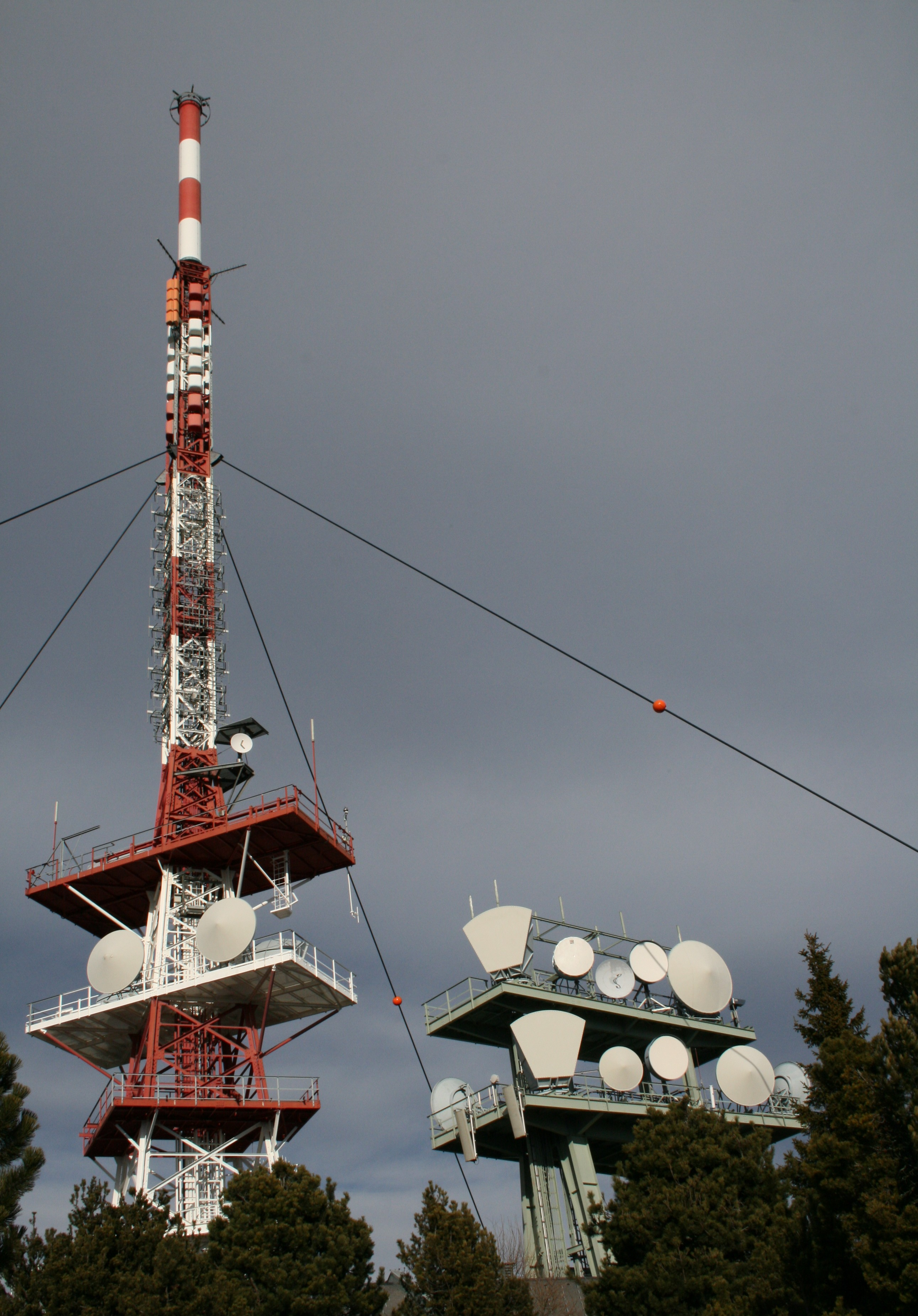 Sendestation am Schöckl, Steiermark, Österreich. (Schöckl mountain, Styria, Austria)